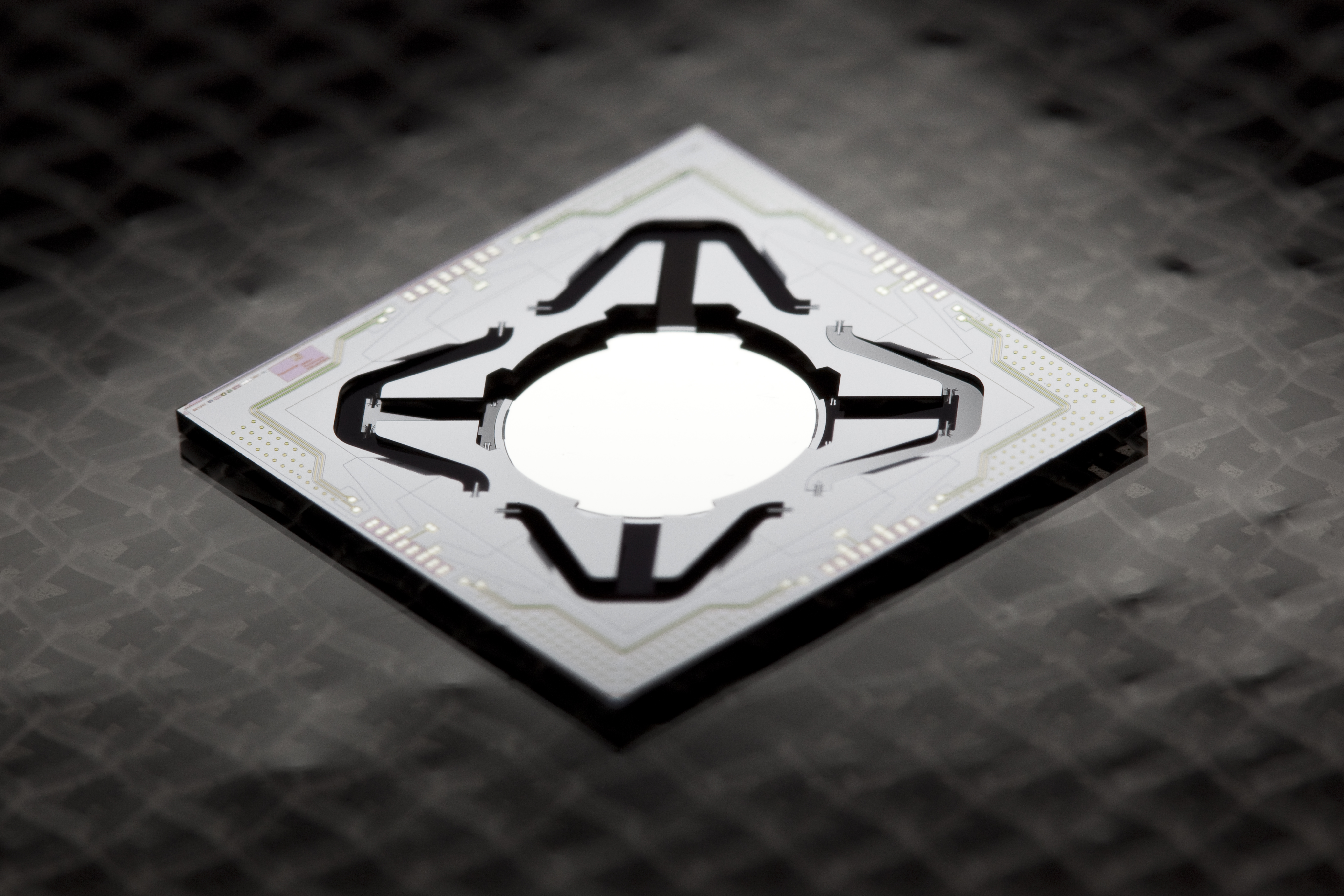 Translatorischer Mikroscanner im Pantographen-Design